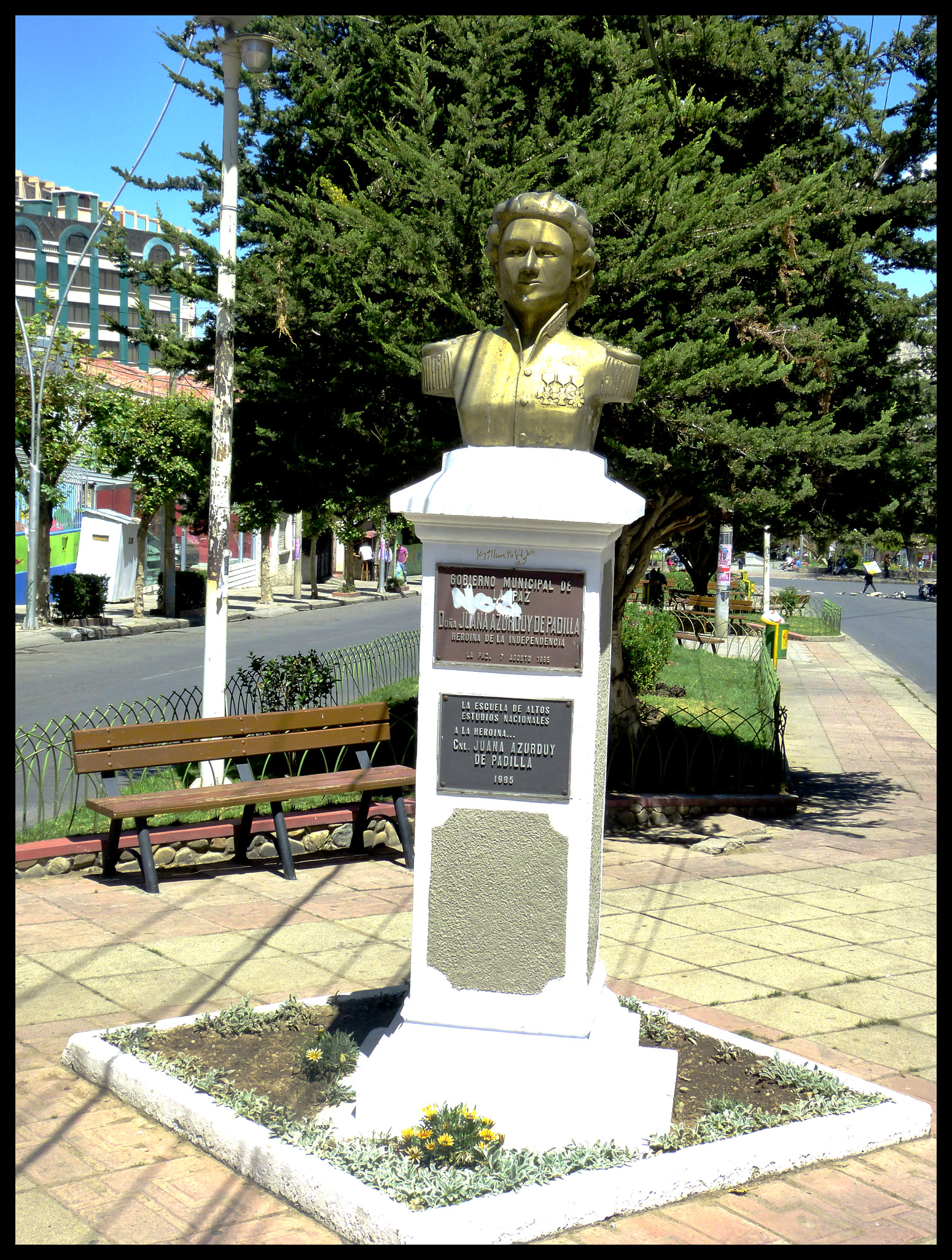 Juana Azurduy de Padilla This medium shows the protected monument with the number L/00-243 in Bolivia.